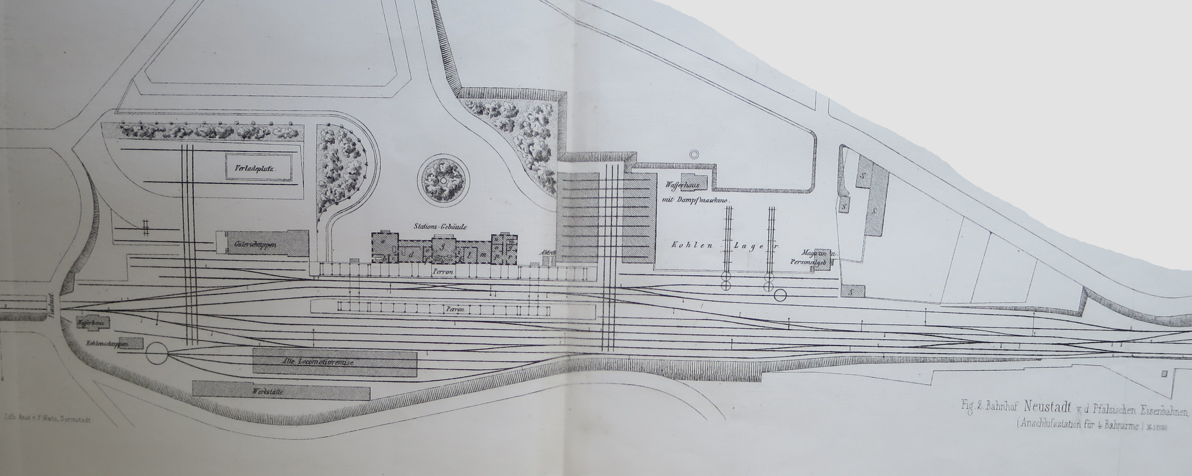 Gleisplan von Neustadt a.d. Haardt 1870, heute: Neustadt (Weinstraße) Hauptbahnhof